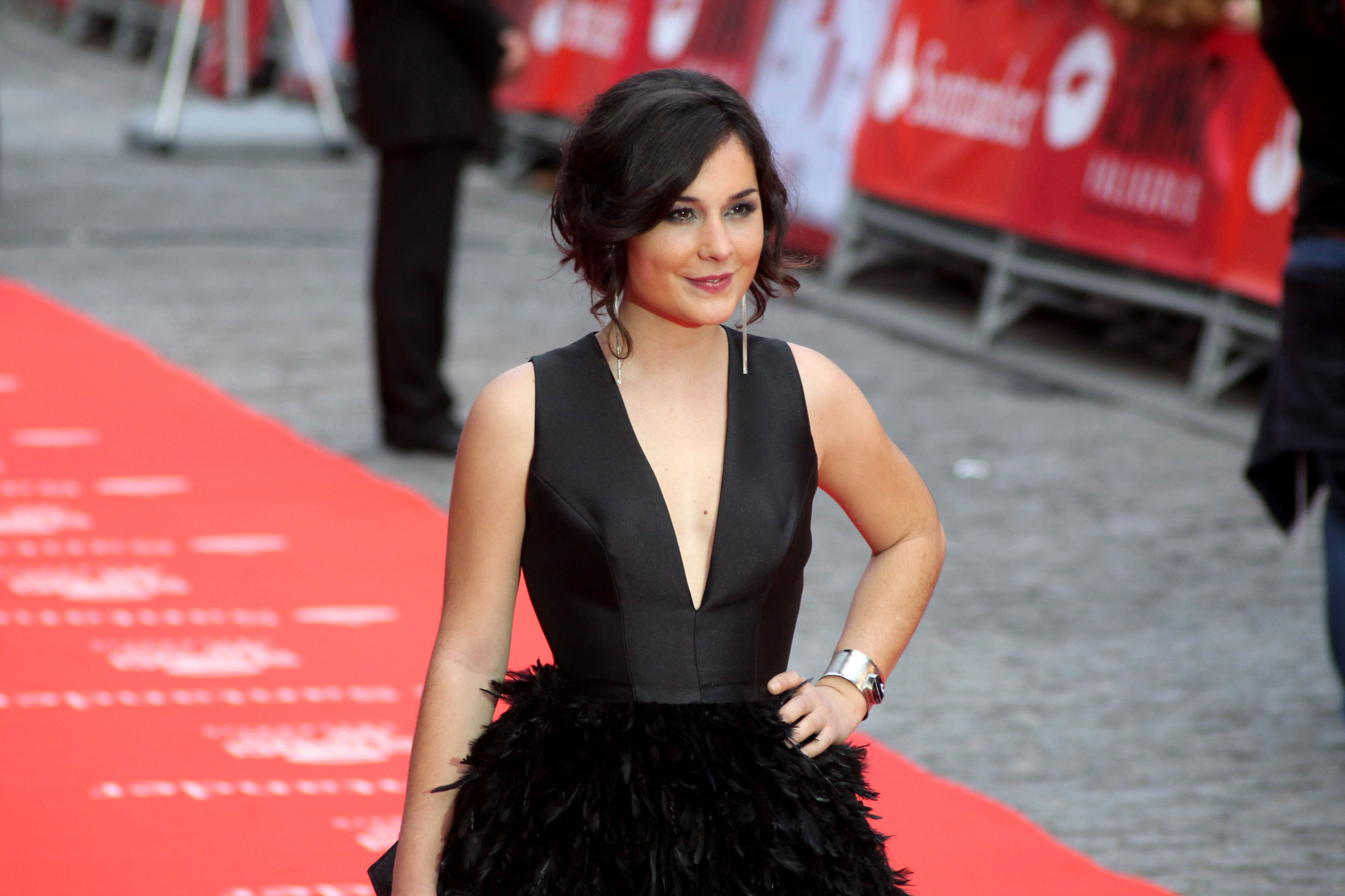 Seminci 2015